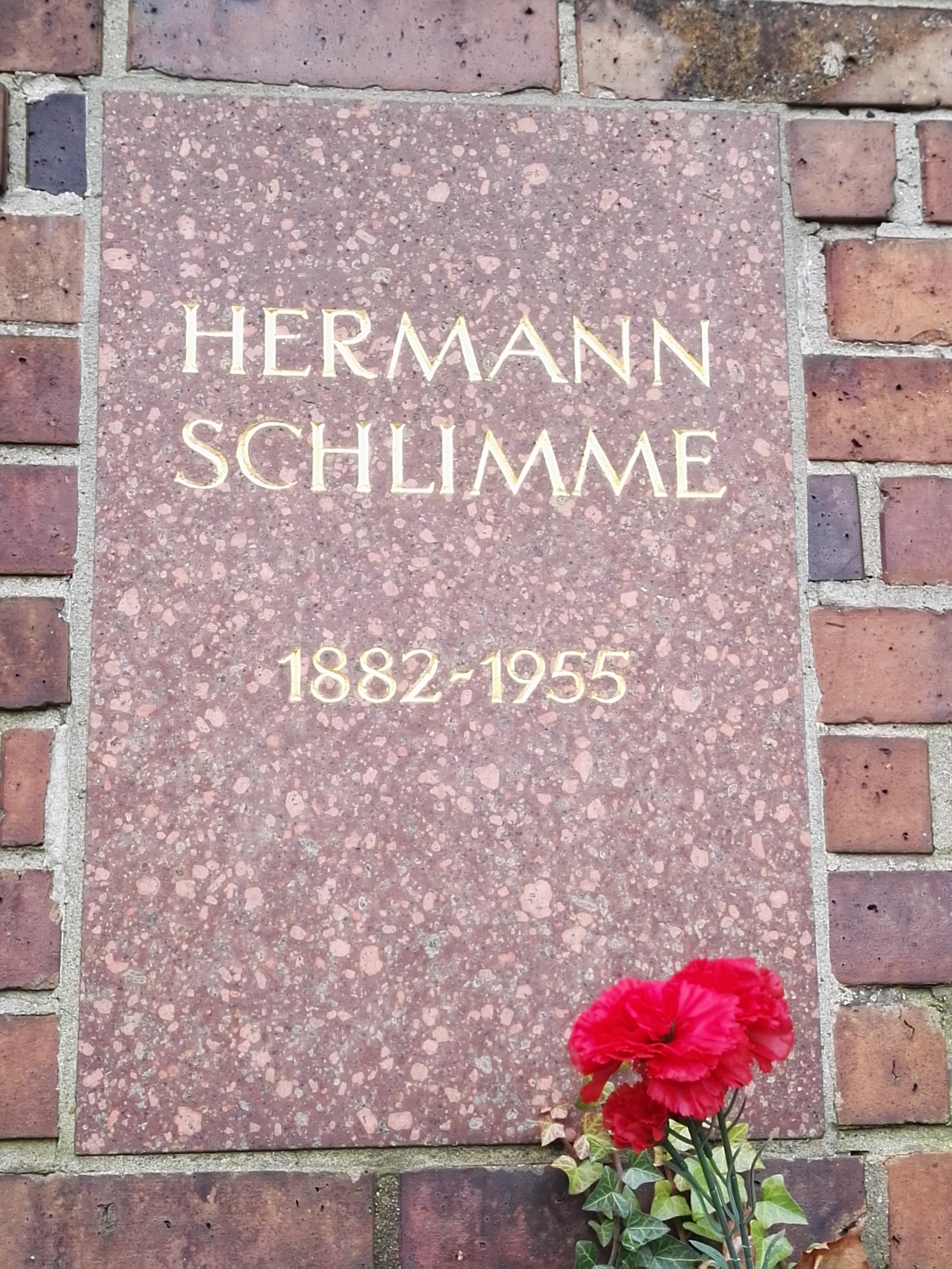 Grab von Hermann Schlimme in der Gedenkstätte der Sozialisten auf dem Zentralfriedhof Friedrichsfelde in Berlin-Lichtenberg